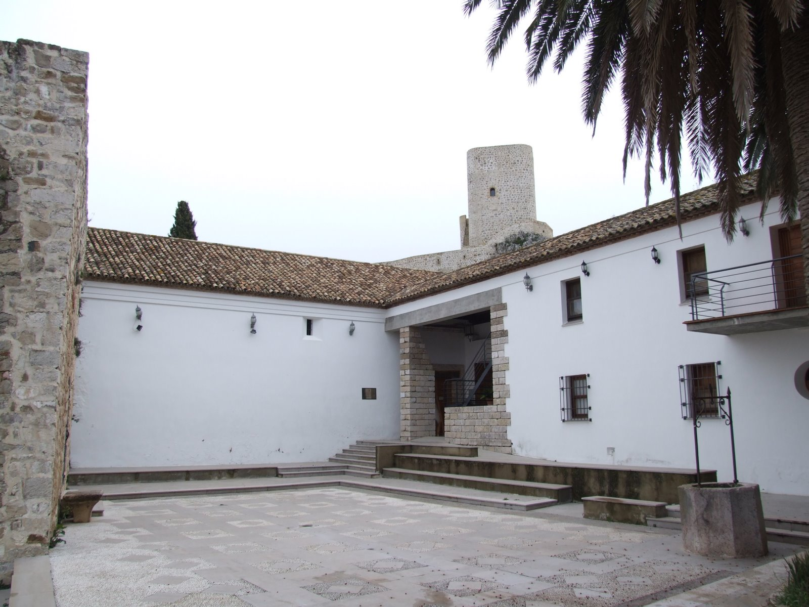 La cilla, lugar donde se encuentra el Museo "la frontera y los castillos", Olvera (Cádiz)